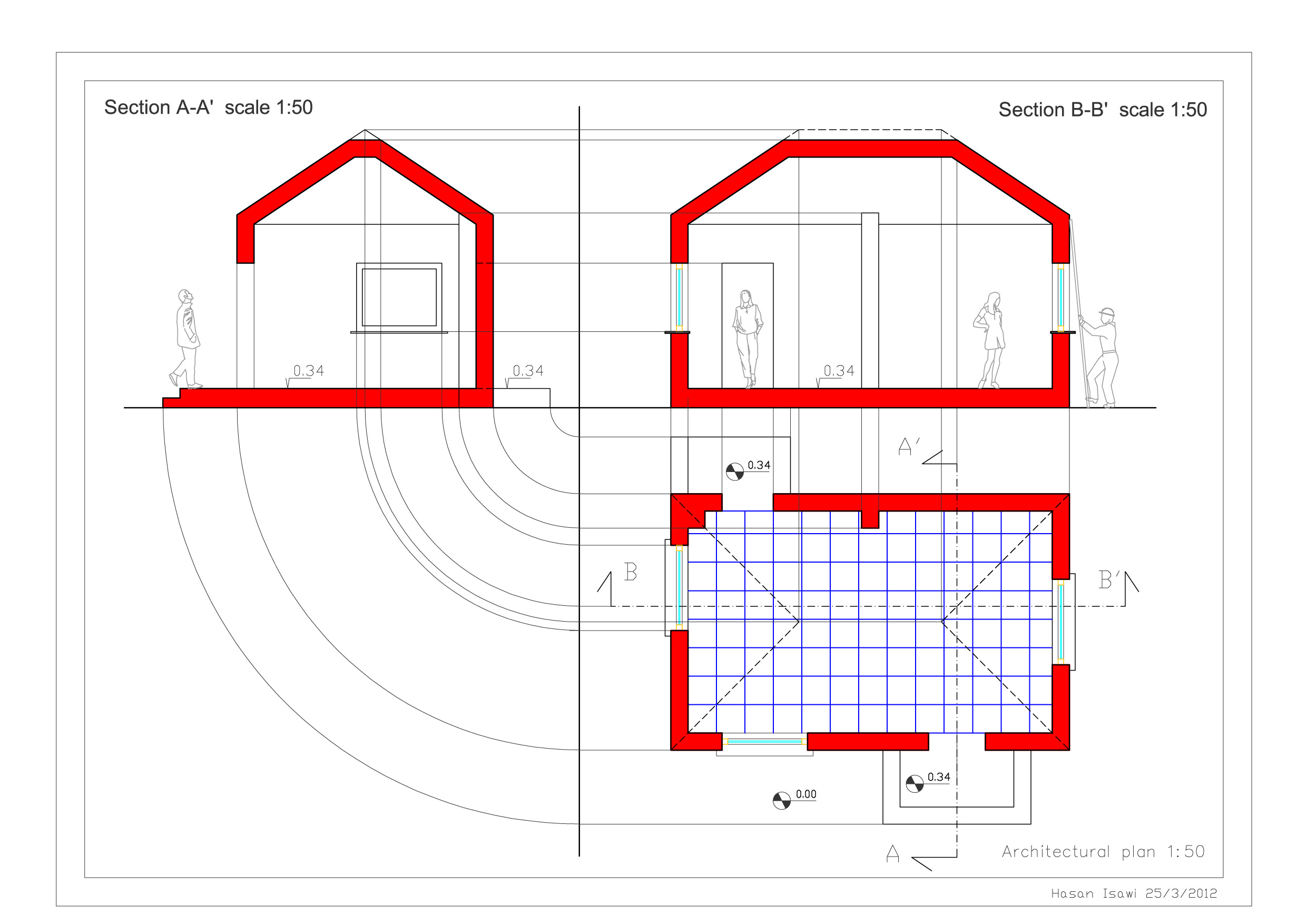 مقطع عرضي في الاكسنومتري الكافاليرا الافقية - cross_sectione_in_plane_oblique_view